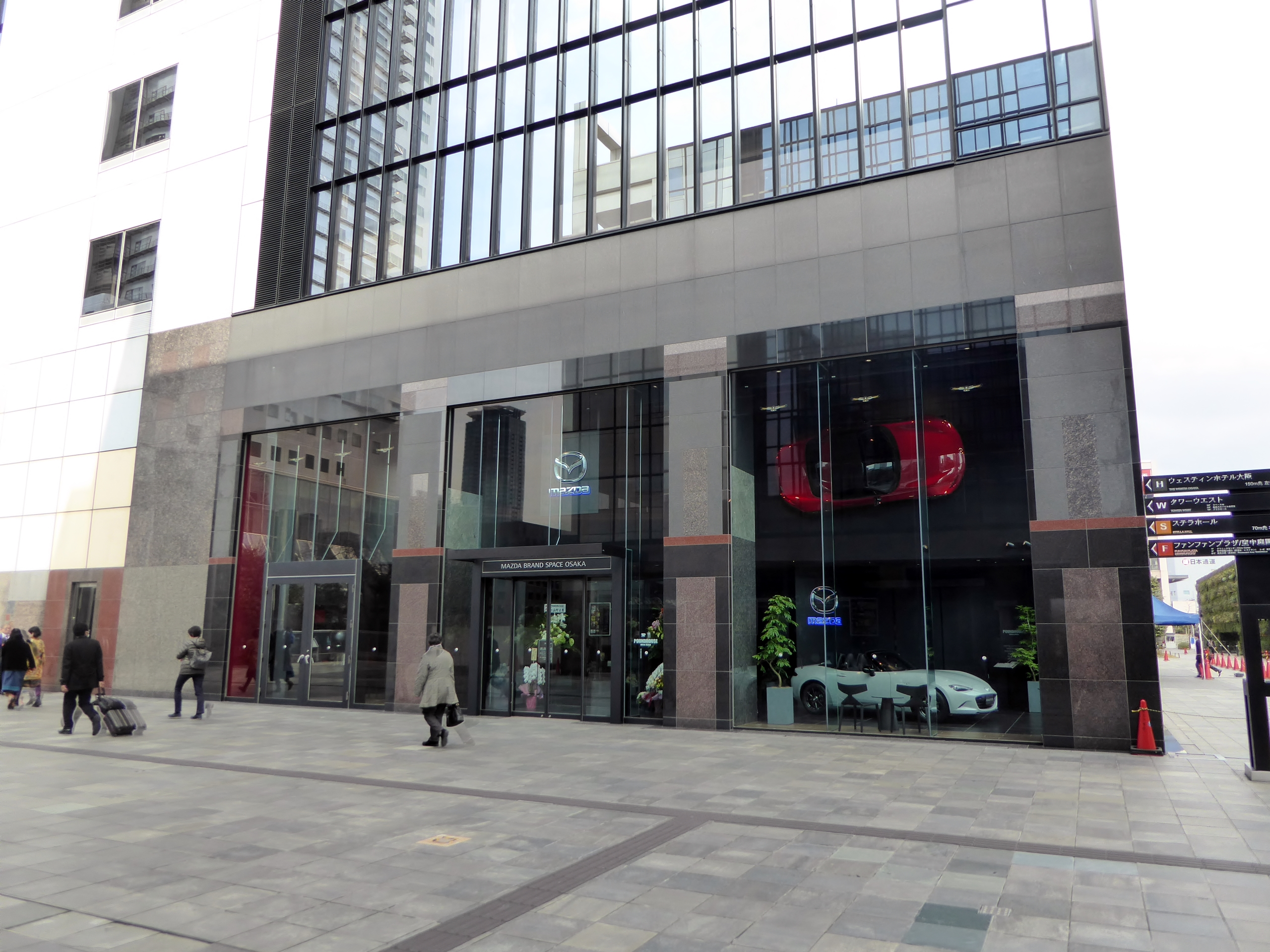 マツダグランドスペース大阪を撮影。